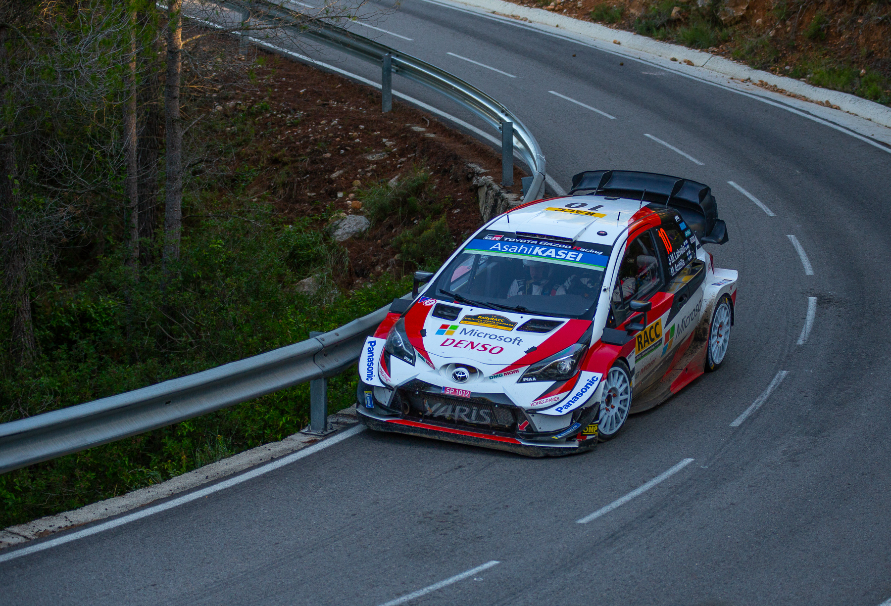 Rajd Hiszpanii 2019 - Latvala Jari-Matti